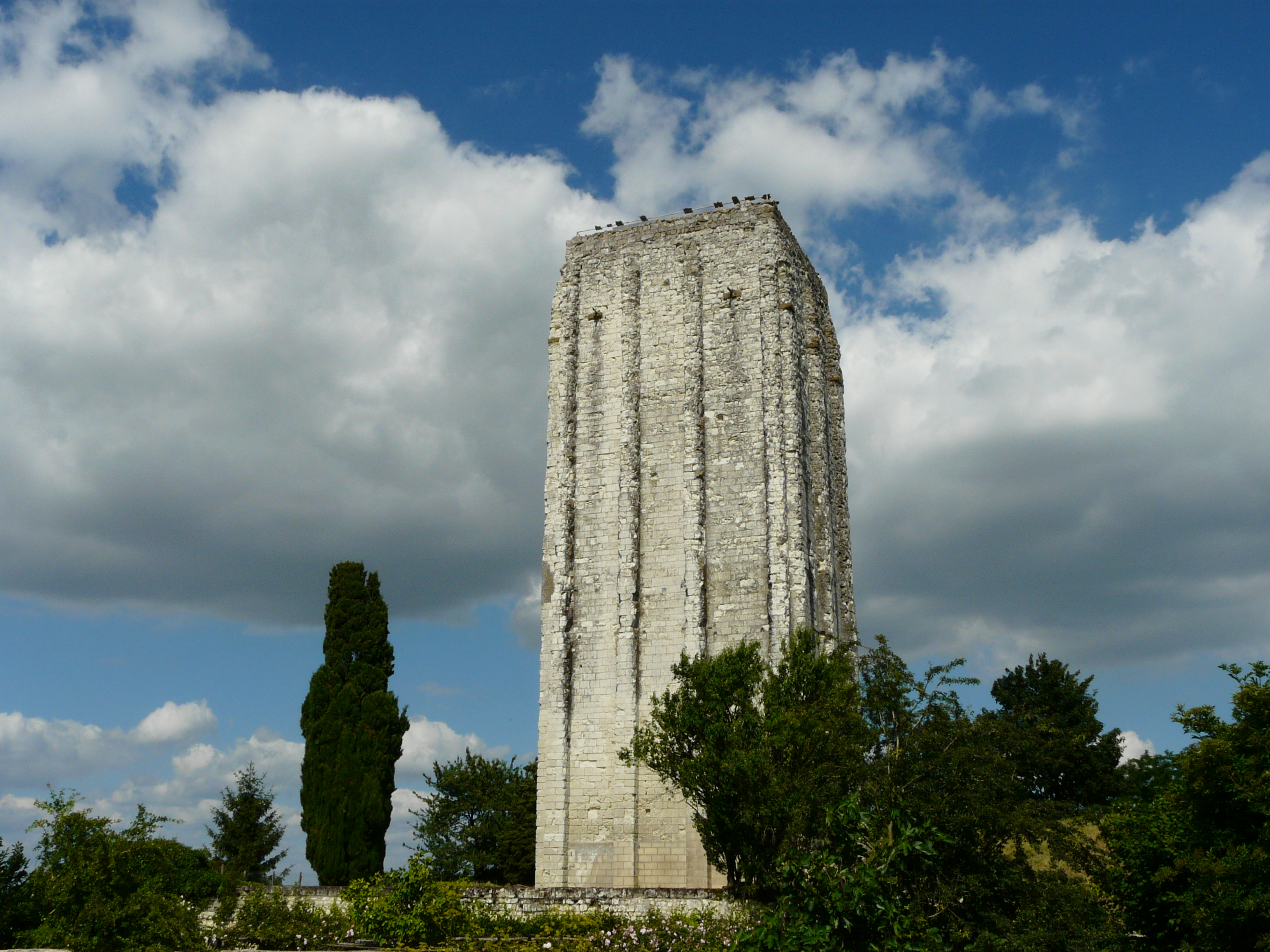 La Tour carrée, Loudun, Vienne, France